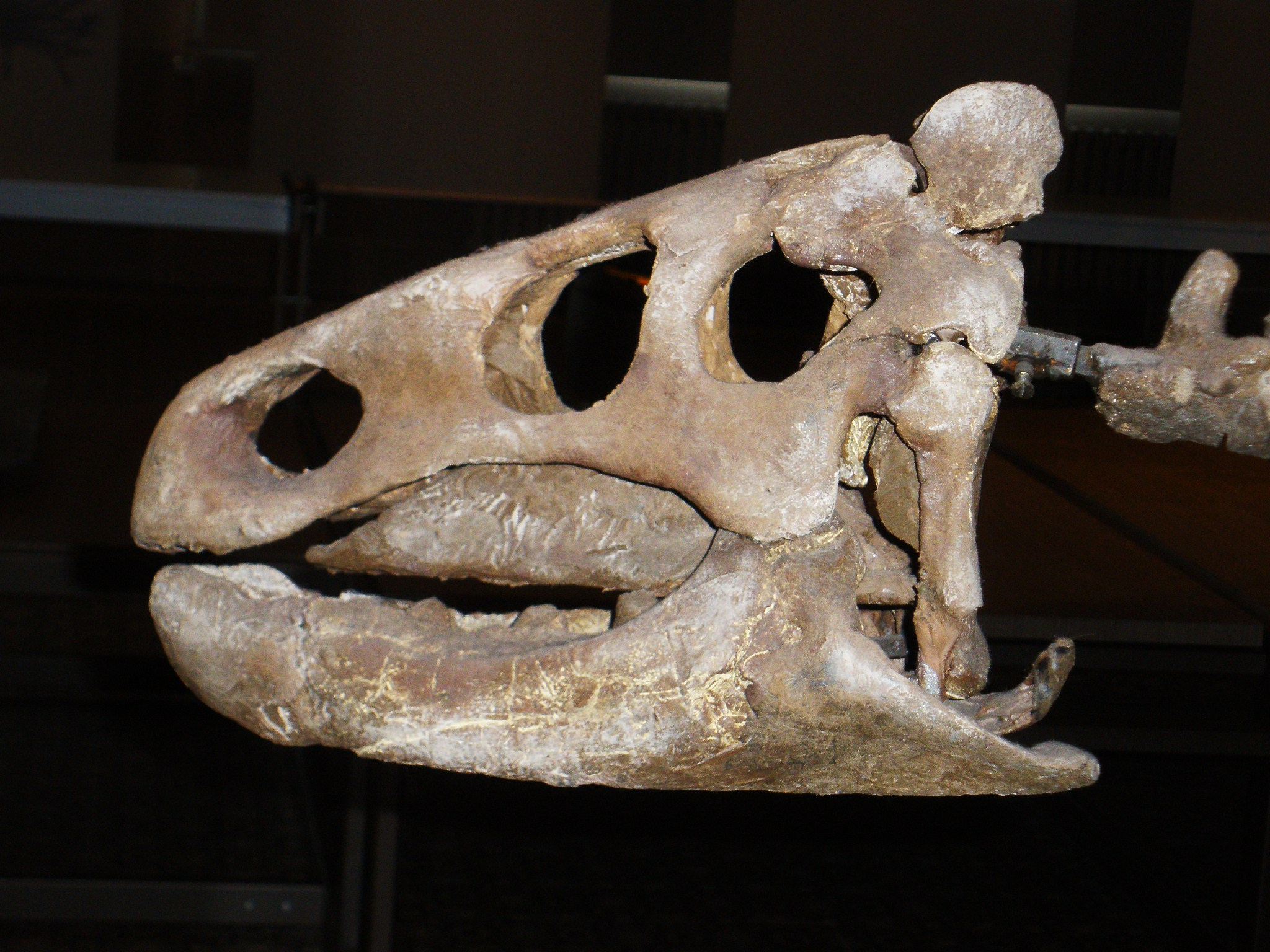 Fossil of Zalmoxes, an ornithopod dinosaur Took the photo at Musee d'Histoire Naturelle, Brussels